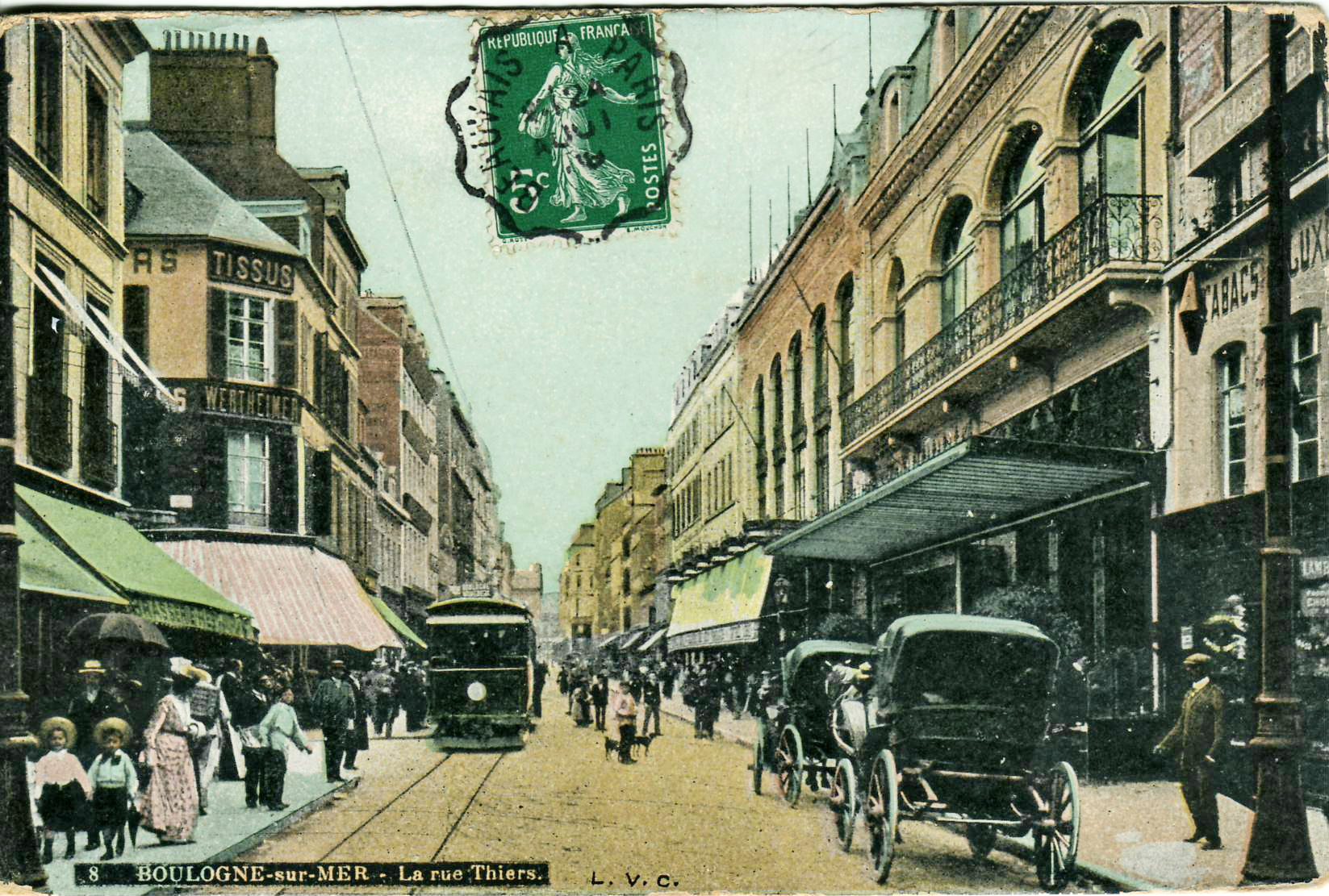 Carte postale ancienne éditée par LVC, n°8 : BOULOGNE-SUR-MER - La Rue Thiers